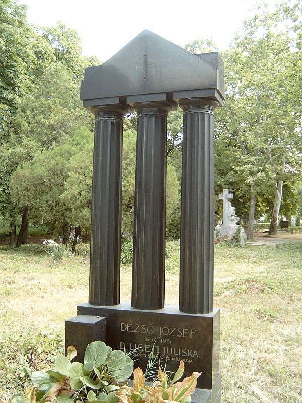 Dezső József (Lesencetomaj, 1867, ápr. 28. – Bp., 1915. máj. 14.): színész és Ligeti Juliska (Bp., 1877. dec. 8. – Bp., 1945. jún. 25.): drámai színésznő sírja Budapesten. Kerepesi temető: 26/1-4-9.